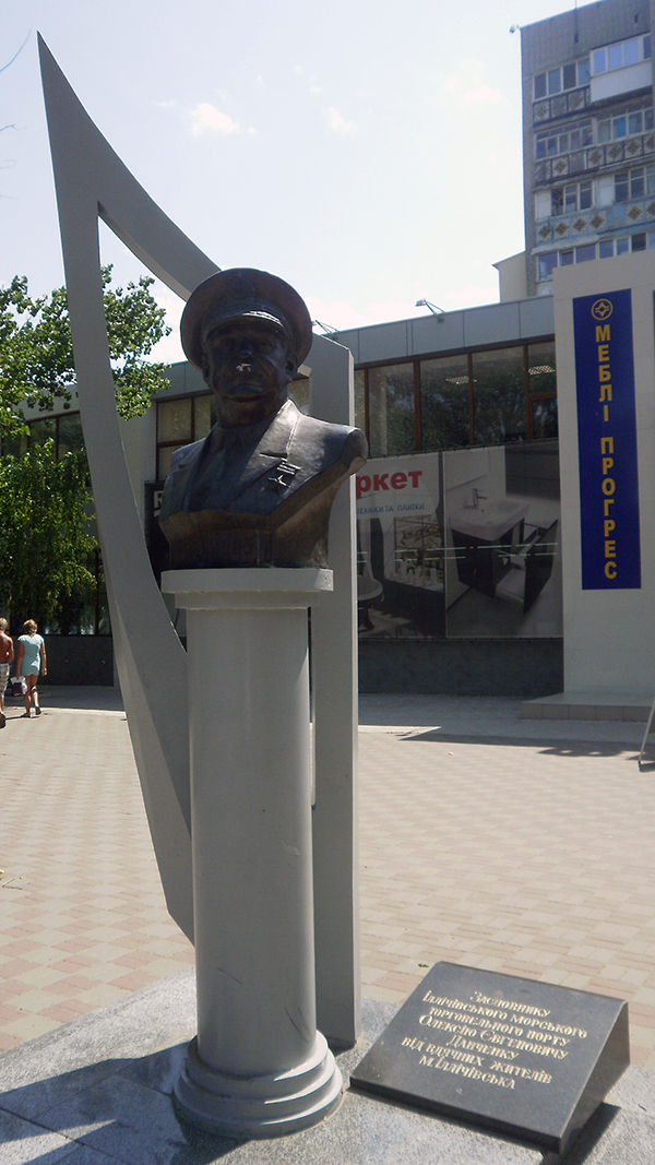 Ильичёвск